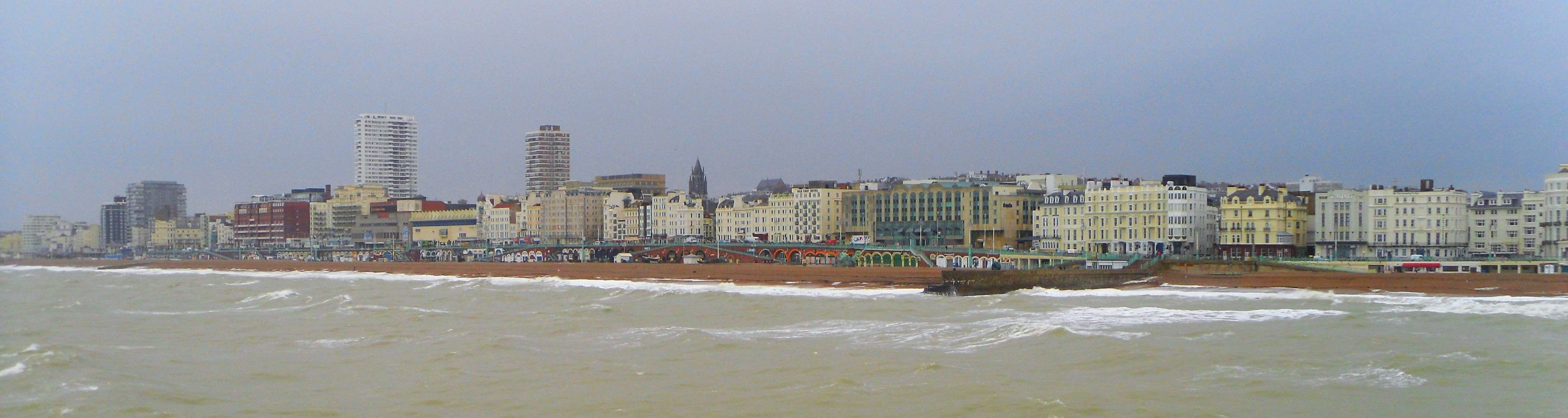 Brighton Seafront mit Kings Road vom Brighton Pier aus